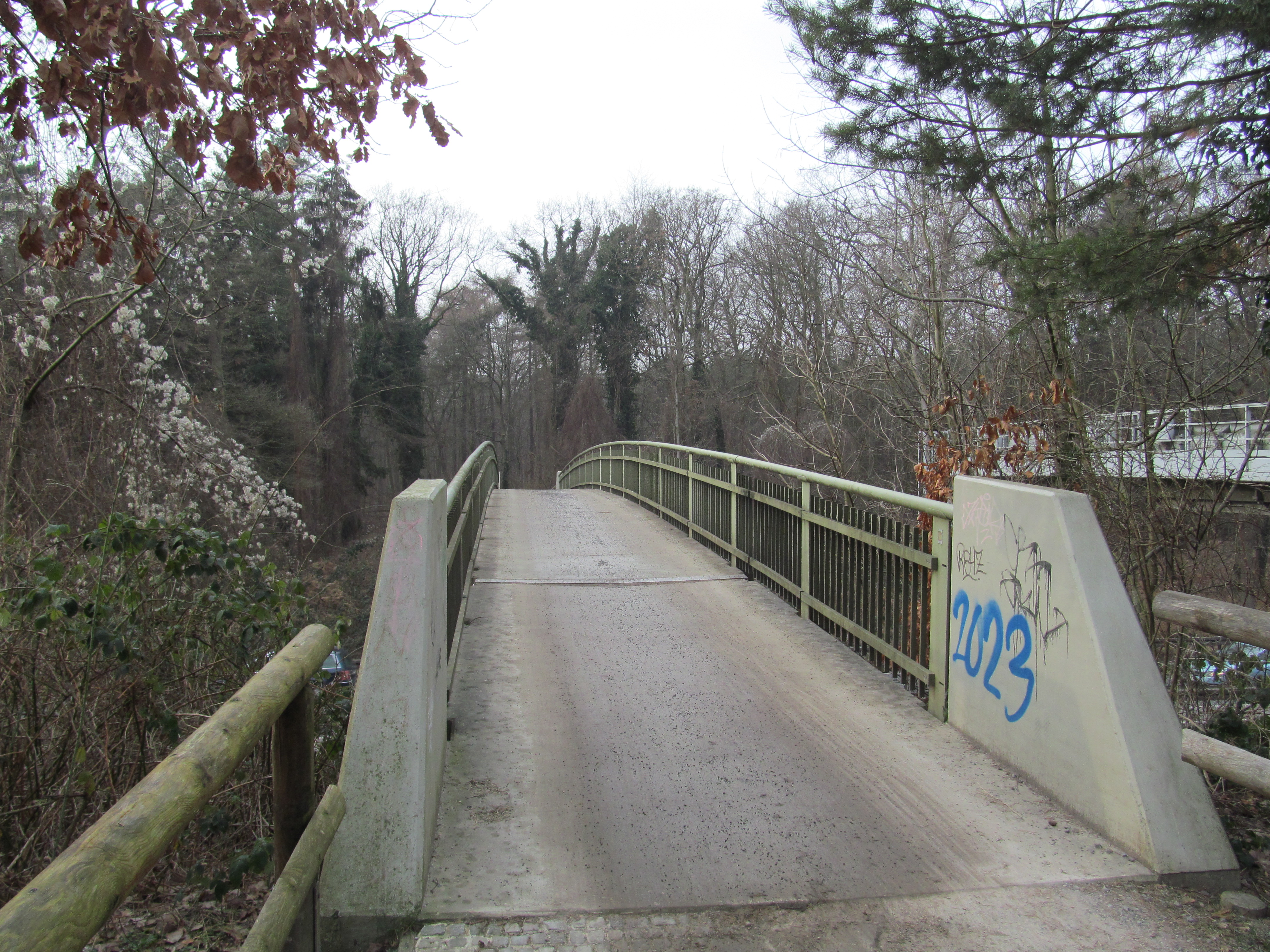 die Rut-und-Klaus-Bahlsen-Brücke ist die mittlere von drei Fußgängerbrücken über den Messeschnellweg in Hannover zwischen dem Weidetorkreisel und der Pferdeturmkreuzung